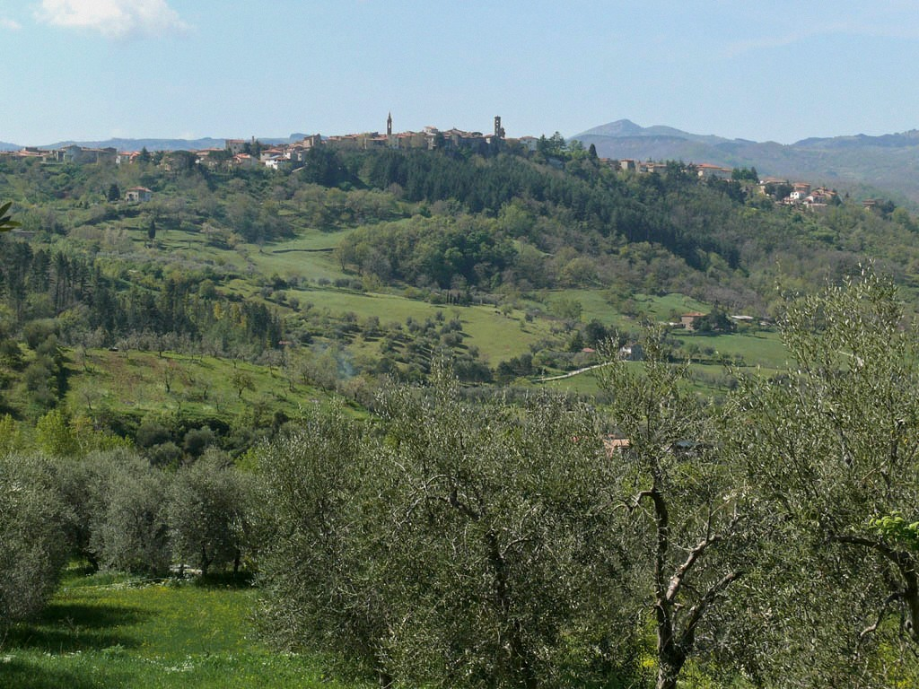 Castel del Piano, view